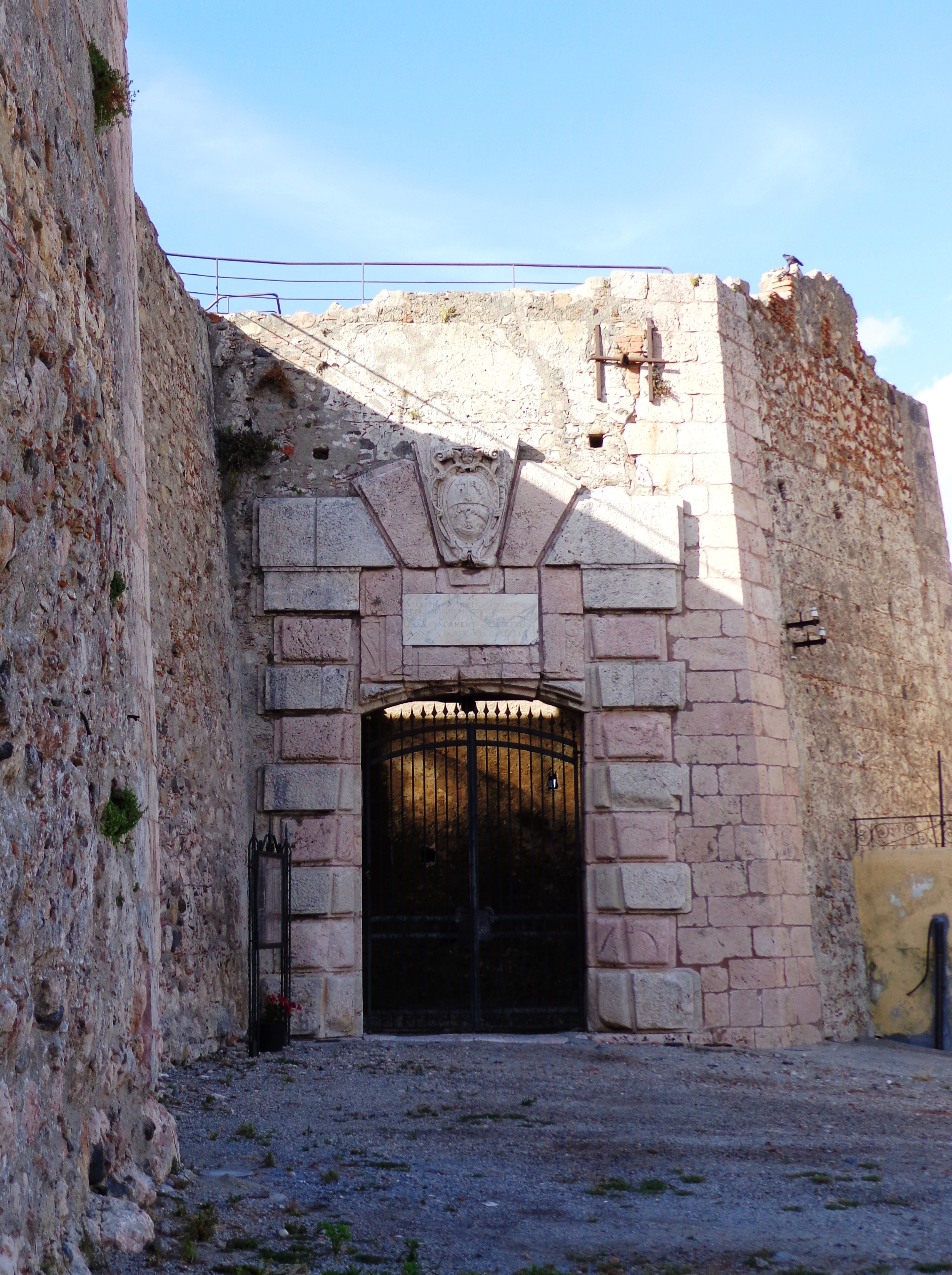 Castello di Bauso This is a photo of a monument which is part of cultural heritage of Italy.